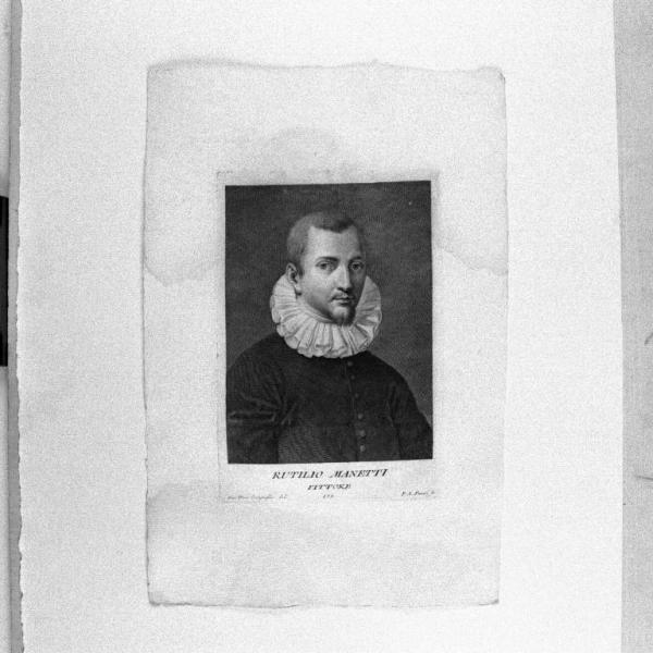 Portrait du Rutilio Manetti ((1571-1639)